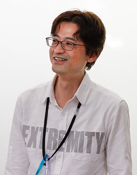 落合真司ポートレート2017年撮影